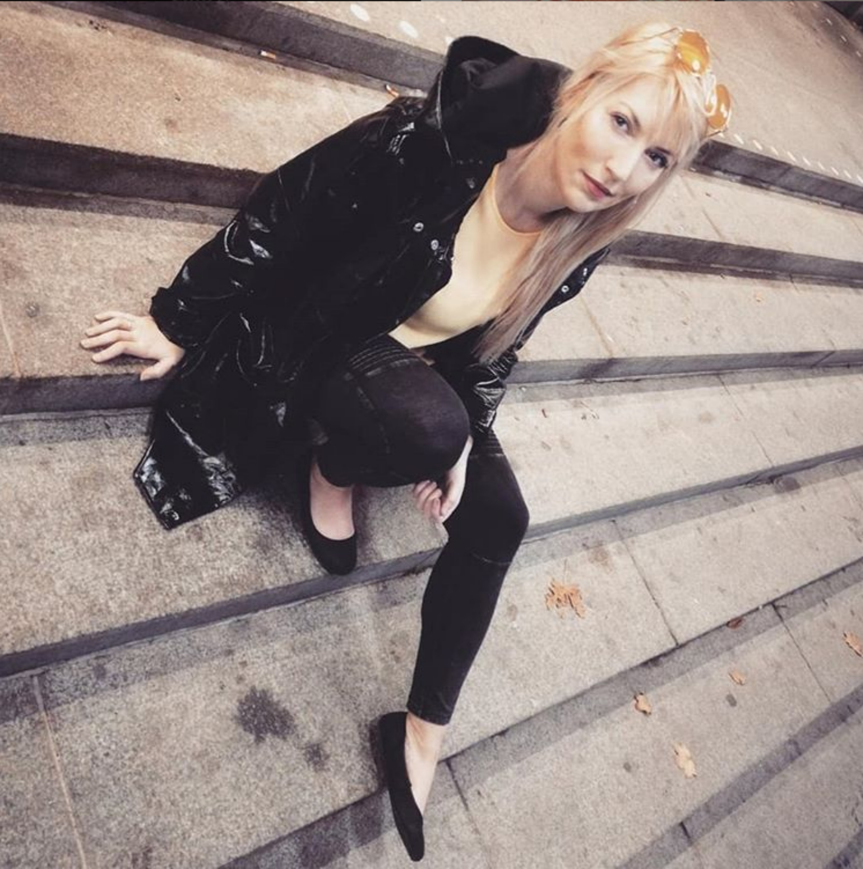 Bild på Martina